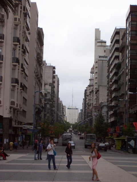 Avenida 18 de Julio vista desde la plaza Independencia, Montevideo, Uruguay. Fotografía tomada por Federico Corral aka Shant.